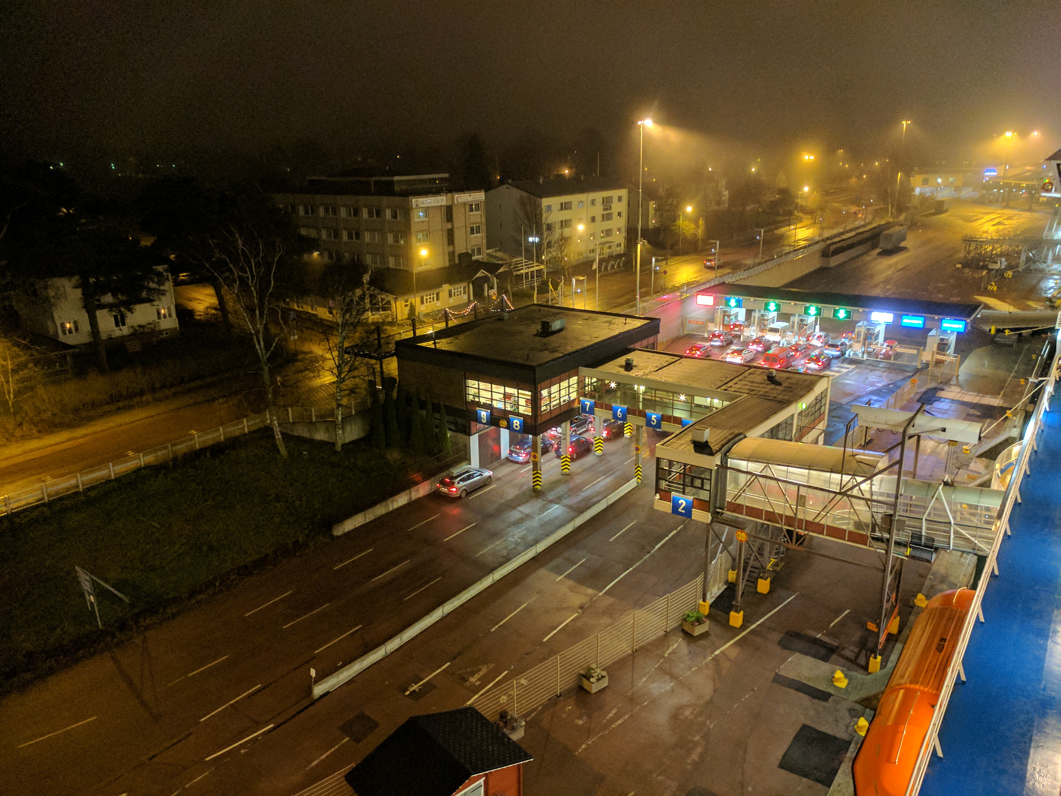 Birka Paradise - december 2016